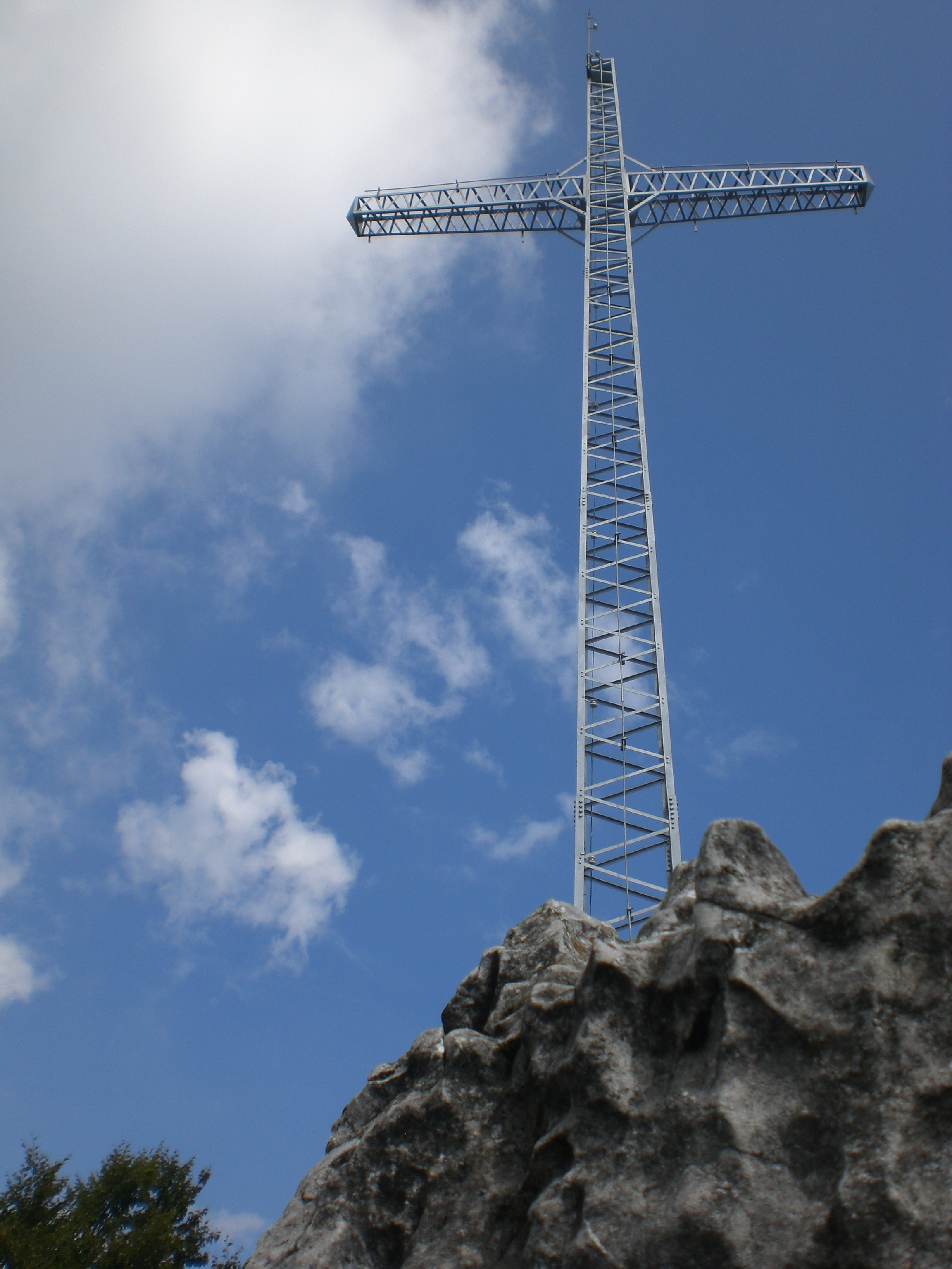 Croce del Monte Zucco - Foto realizzata da Daniela Bonzi